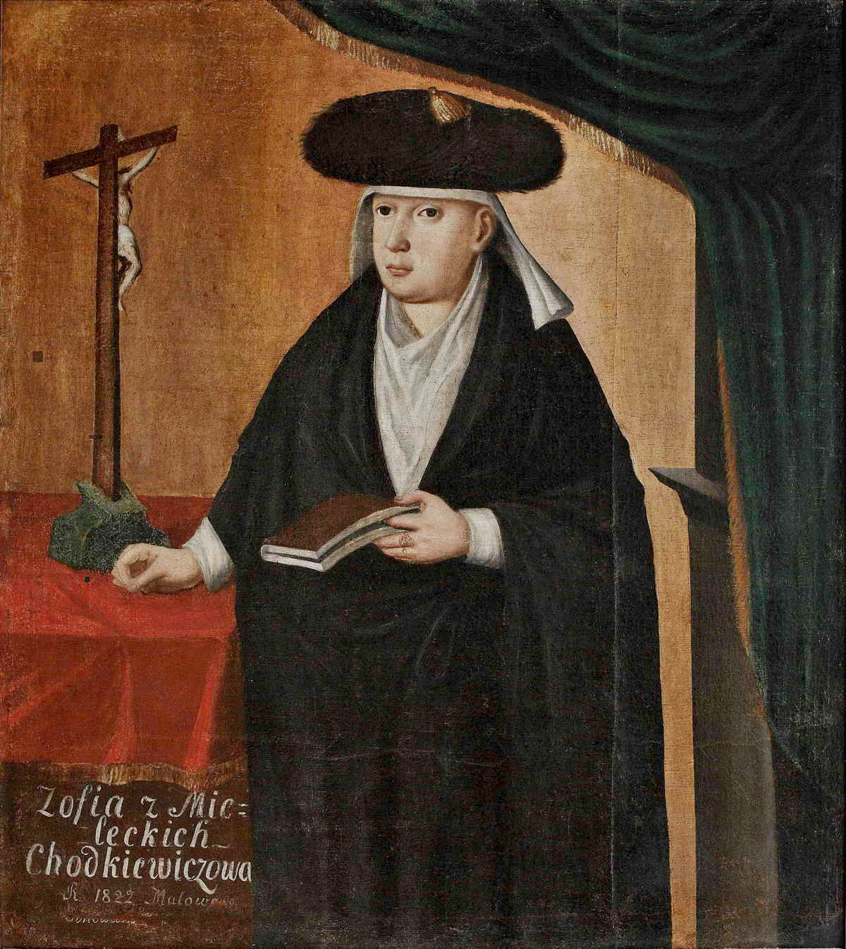 Беларуская (тарашкевіца): Партрэт Соф’і Хадкевіч (Sofja Chadkievič) зь Мялецкіх (Mialecki)